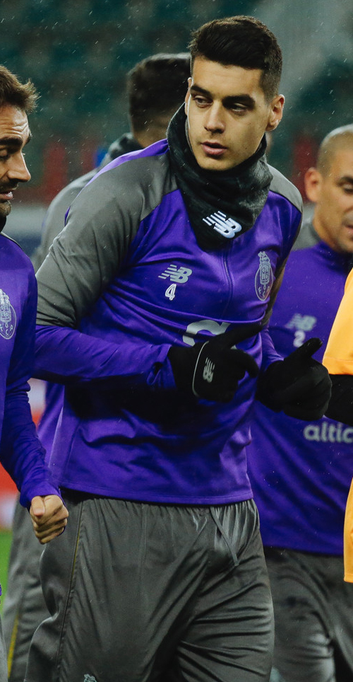 Икер Касильяс вместе с «Порту» готовится к матчу с «Локомотивом»